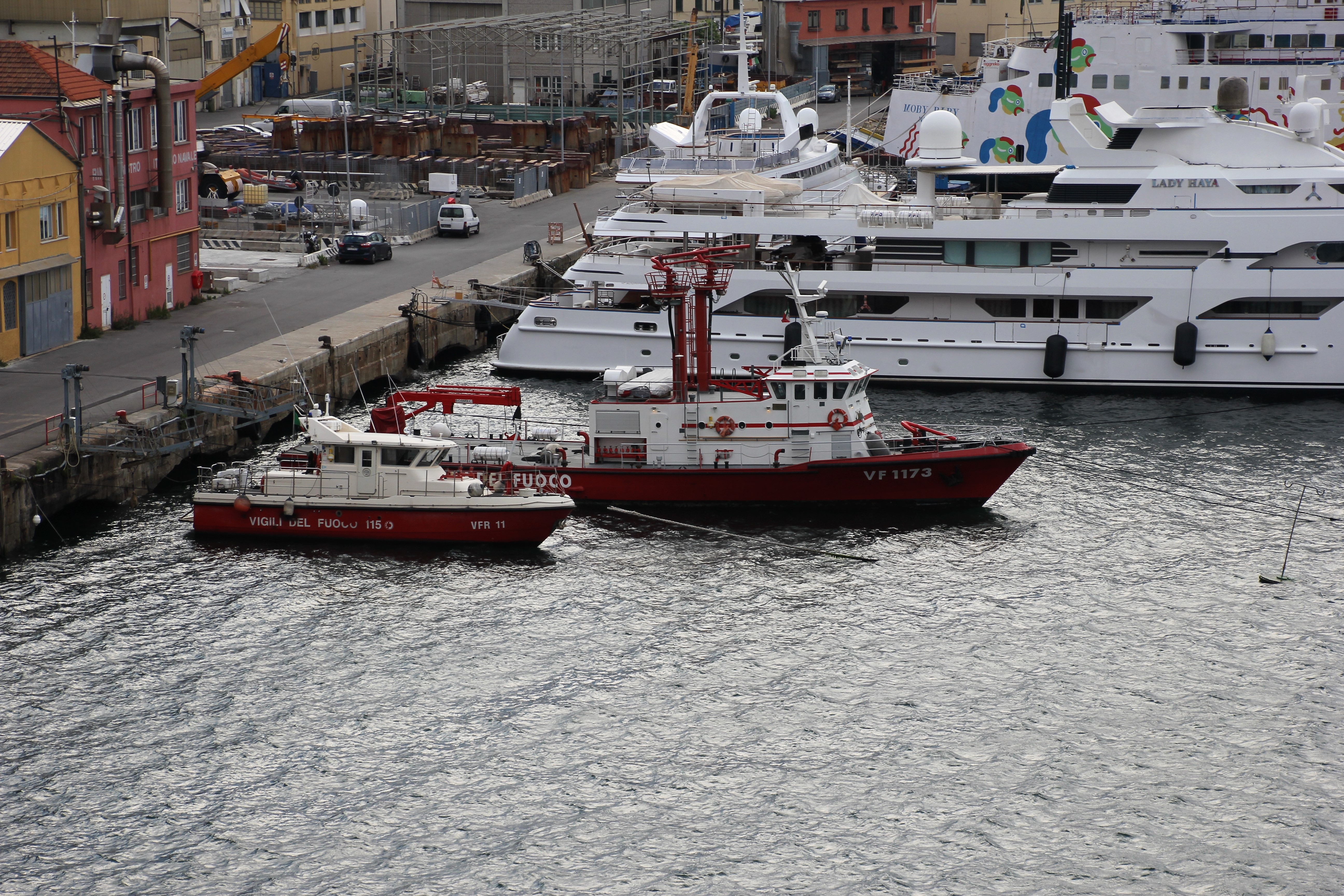 Genova, imbarcazioni dei vigili del fuoco